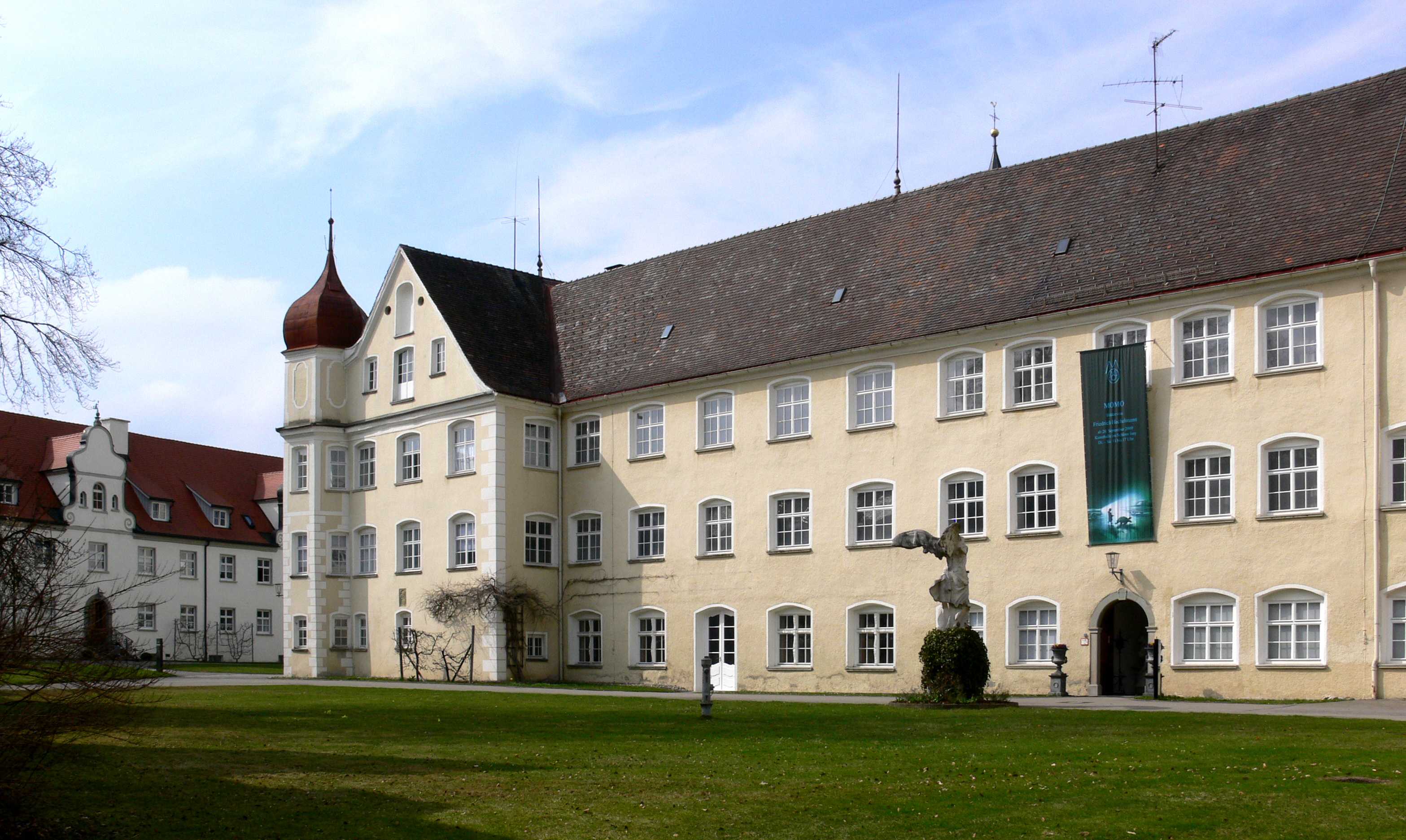 Isny im Allgäu, ehem. Benediktinerkloster St. Georg („Schloss Isny“)